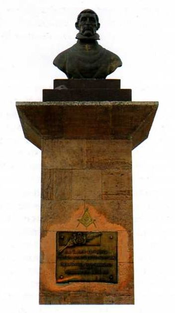 Statue of Toribio Rodriguez de Mendoza